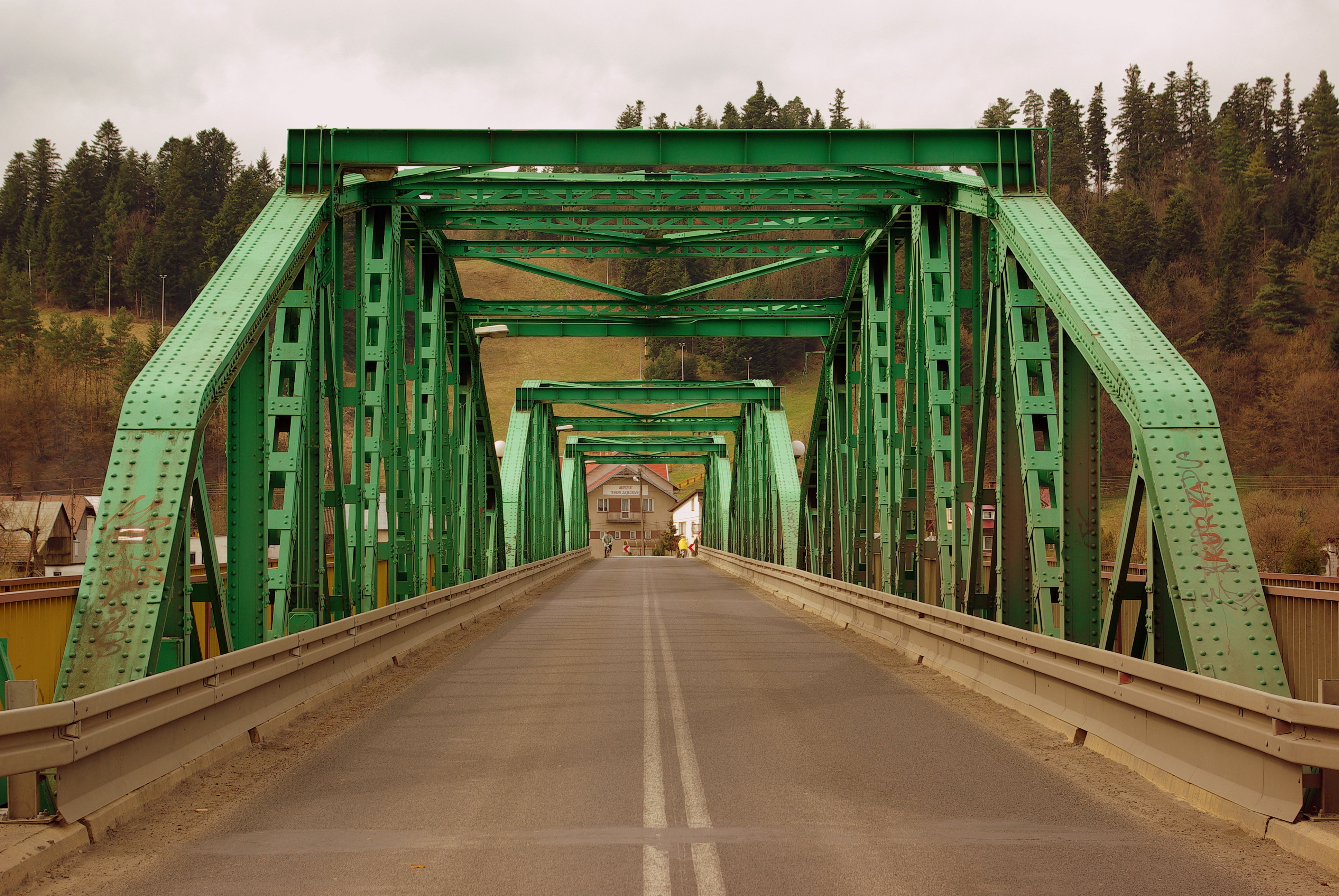 Most na Sanie Huzele